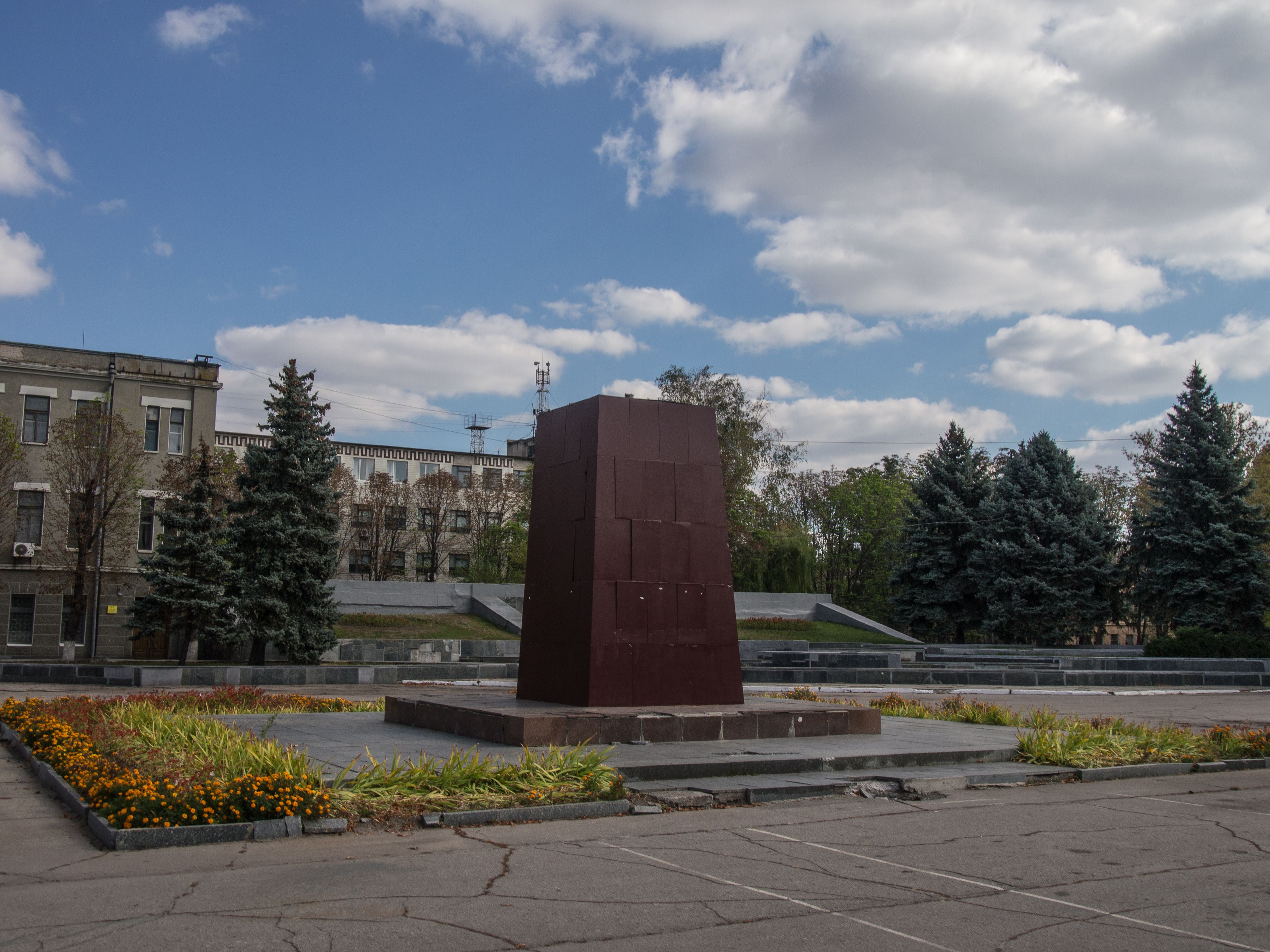 Пам’ятник Леніну В.І., Павлоград, Соборна площа (вул. К. Маркса)